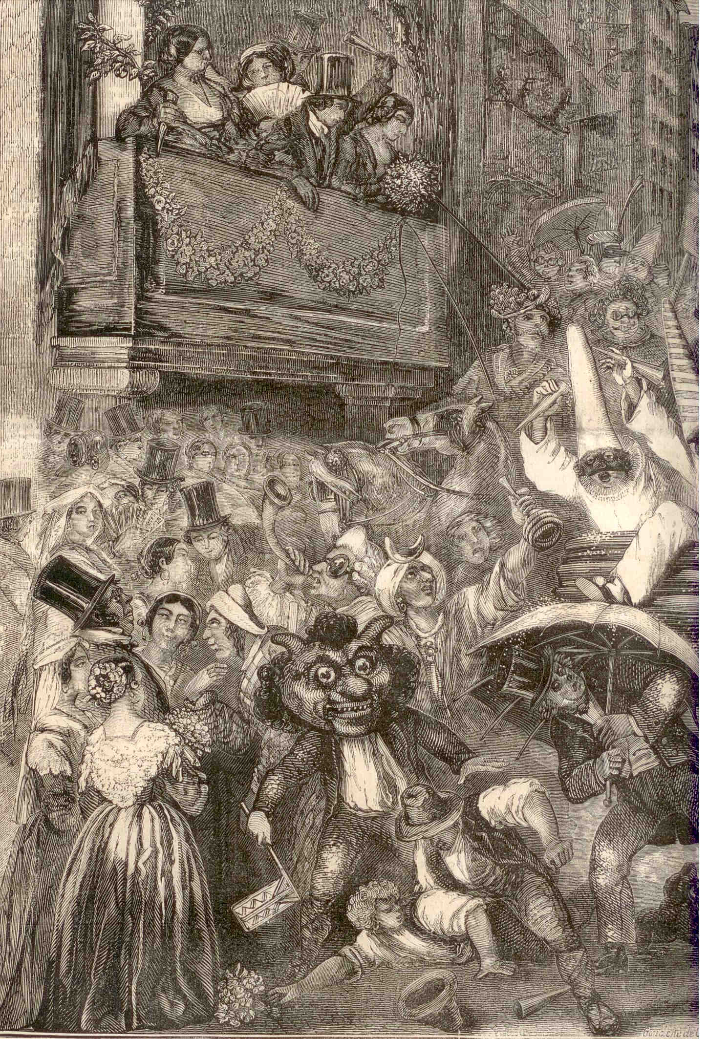 Détail d'une illustration du Carnaval de Rome